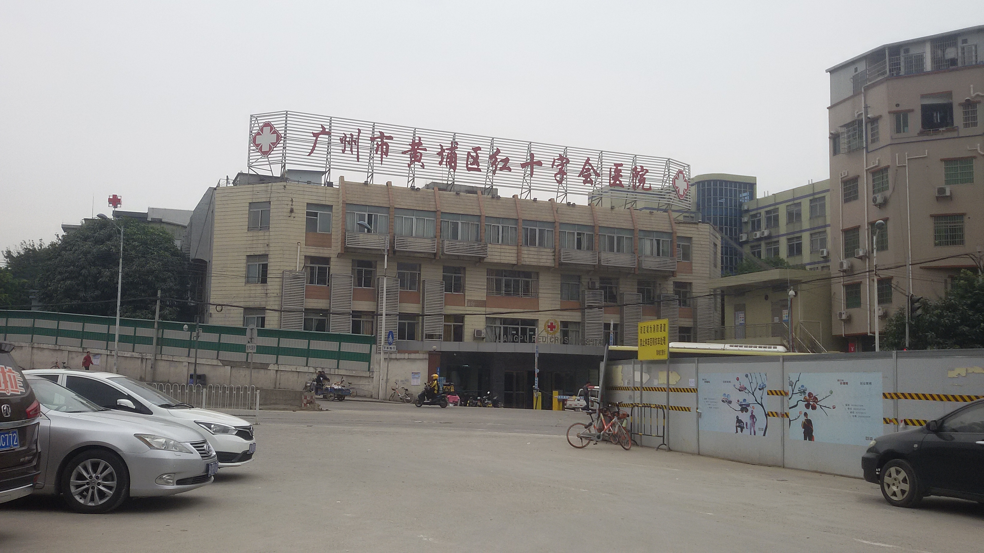 粵語: 黃埔區紅十字會醫院